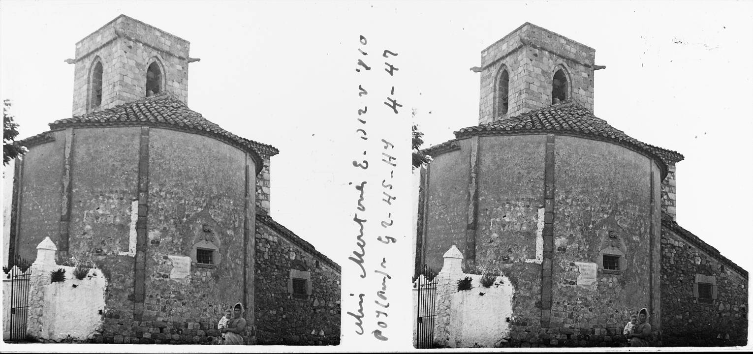 Absis de l'església de Montornès. Josep Salvany i Blanch (1912)